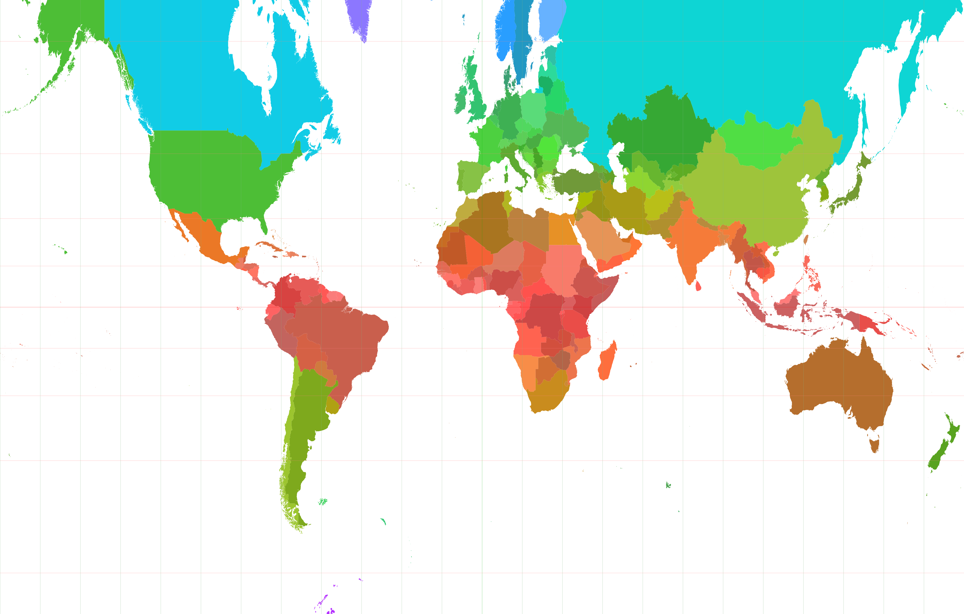 Staatkundige kaart van de Wereld in gnomonische cilinderprojectie met kleuren die varieren met de breedtegraad